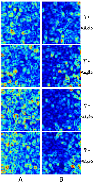 نموداری که فرسایش شیمیایی دندان را طی زمان نشان می‌دهد و با حالت طبیعی آن مقایسه می‌کند. ستون A مربوط به فرسایش شیمیایی دندان بوده و ستون B مربوط به حالت طبیعی آن است